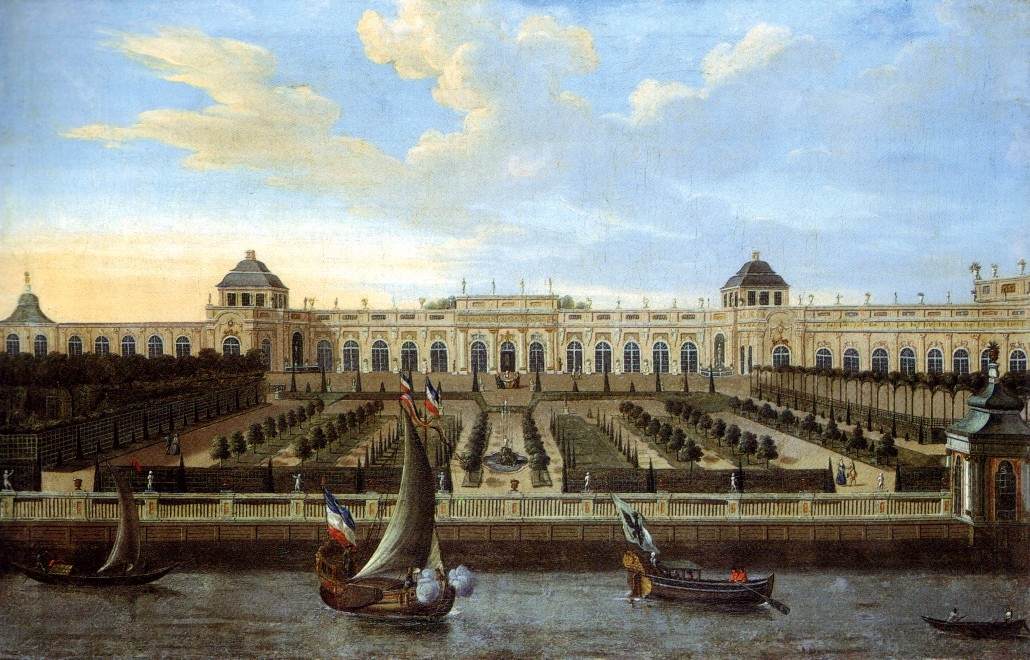 Monbijou palace, Berlin. Oil on canvas